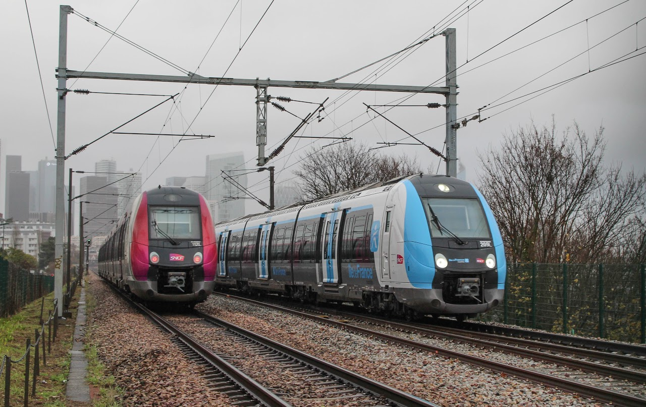 Deux automotrice Z 50000 avec livrées SNCF Carmillon et Île-de-France Mobilités.